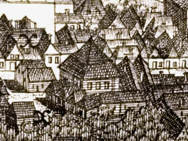 Изображение Большой предместной синагоги Львова на гравюре Франсуа Пернера.